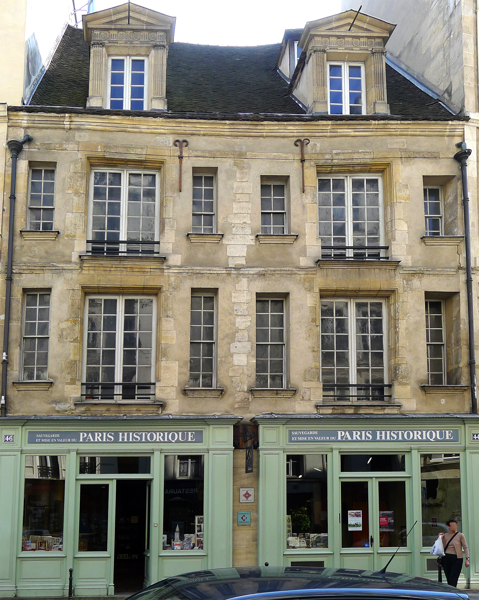 Rue François-Miron (n°44 et 46 façade) - Paris IVHôtel d'Ourscamp ou de Marsande, dit aussi Maison de l'Ours. Situé au 44, 46, 48 rue François-Miron dans le 4e arrondissement de Paris. Construit au XVIe siècle. .